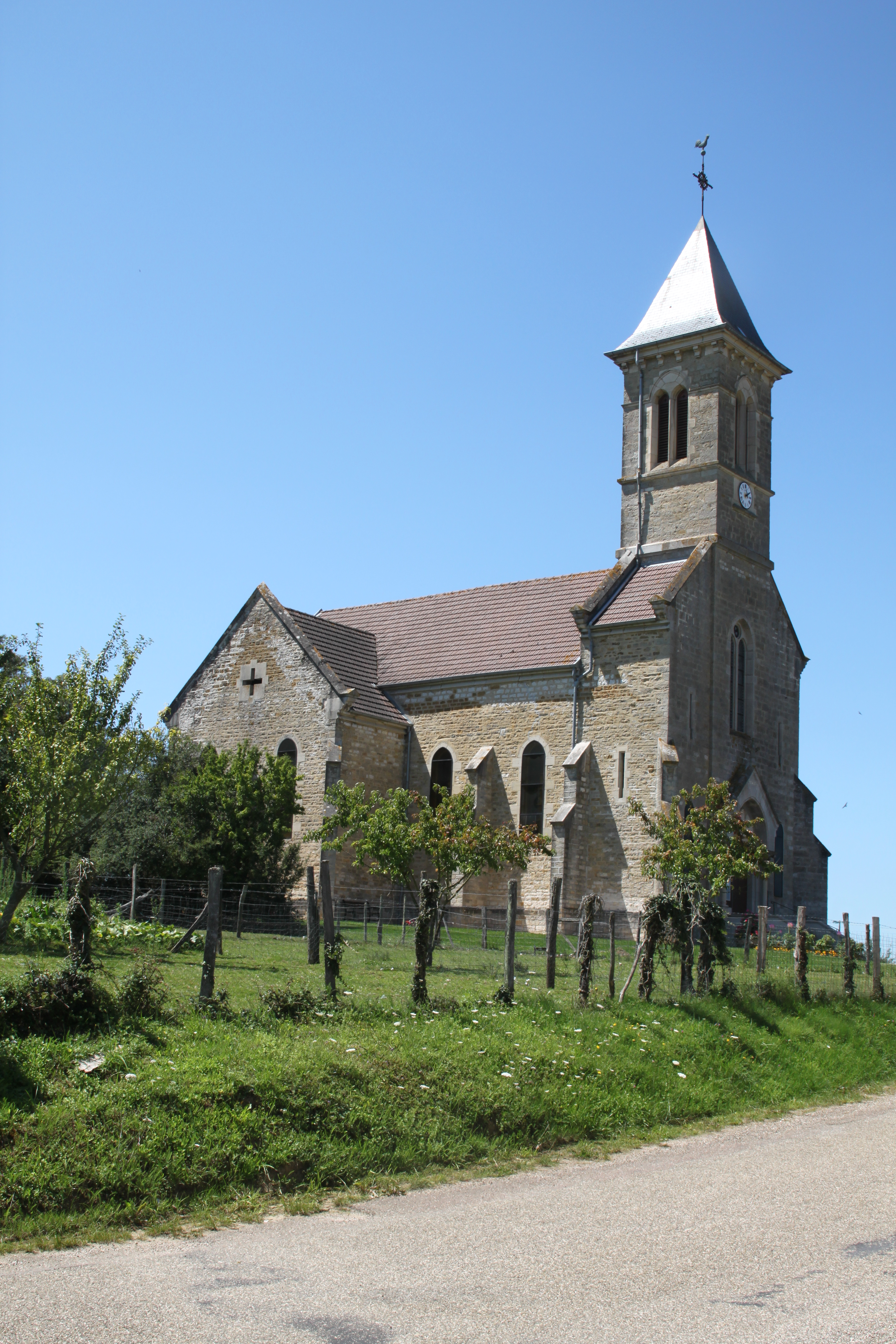 Beauvernois (Saône-et-Loire) Kirche von der Mairie aus gesehen